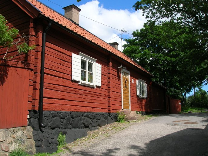 Åsögatan 213, built 1730, Södermalm, Stockholm, Sweden.